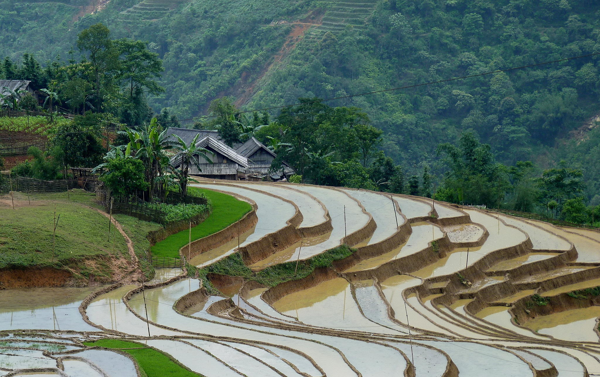 Террасные поля в Са Па, Вьетнам